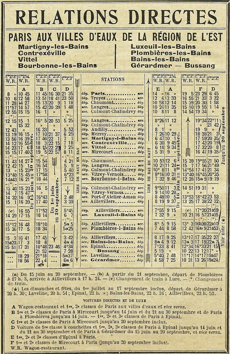 Sommer-Fahrplan Train d’eaux der Chemin de fer de l’Est, Stand 1922